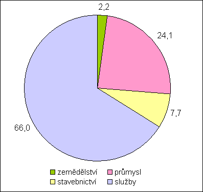 Podíl zaměstnaných podle sektorů Podíl zaměstnaných podle sektorů, v procentech, stav 2001 Sektory: zemědělství, průmysl, stavebnictví, služby